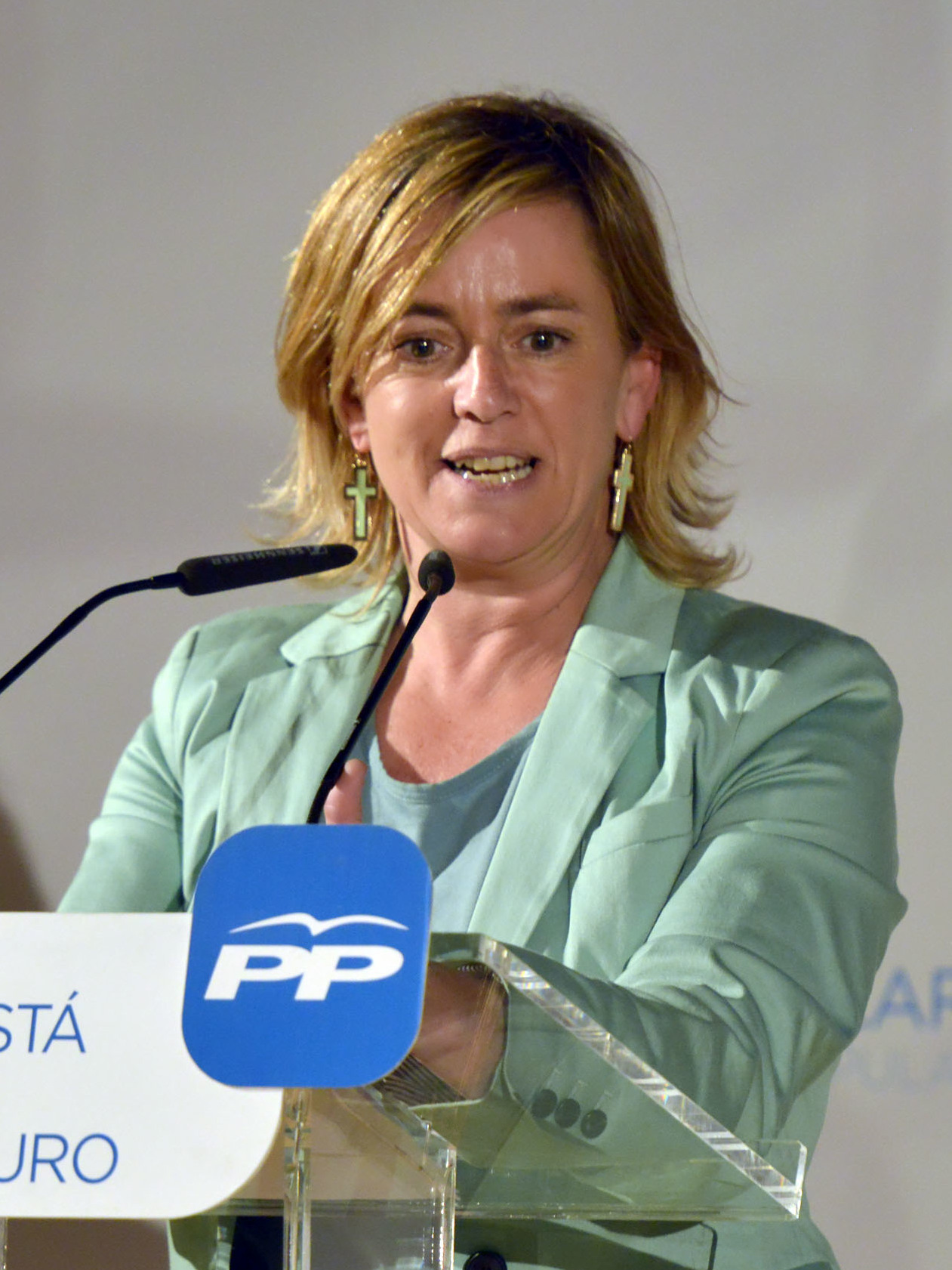 Acto público en Santander. El presidente autonómico del Partido Popular, Ignacio Diego, y la vicepresidenta del Gobierno y miembro del Comité Ejecutivo Nacional del Partido Popular, Soraya Sáenz de Santamaría, intervienen junto a la candidata del PP al Parlamento Europeo, María Luisa Peón, y el alcalde de Santander, Iñigo de la Serna, en el acto público que el PP de Cantabria celebra en el Palacio de Exposiciones y Congresos de Santander